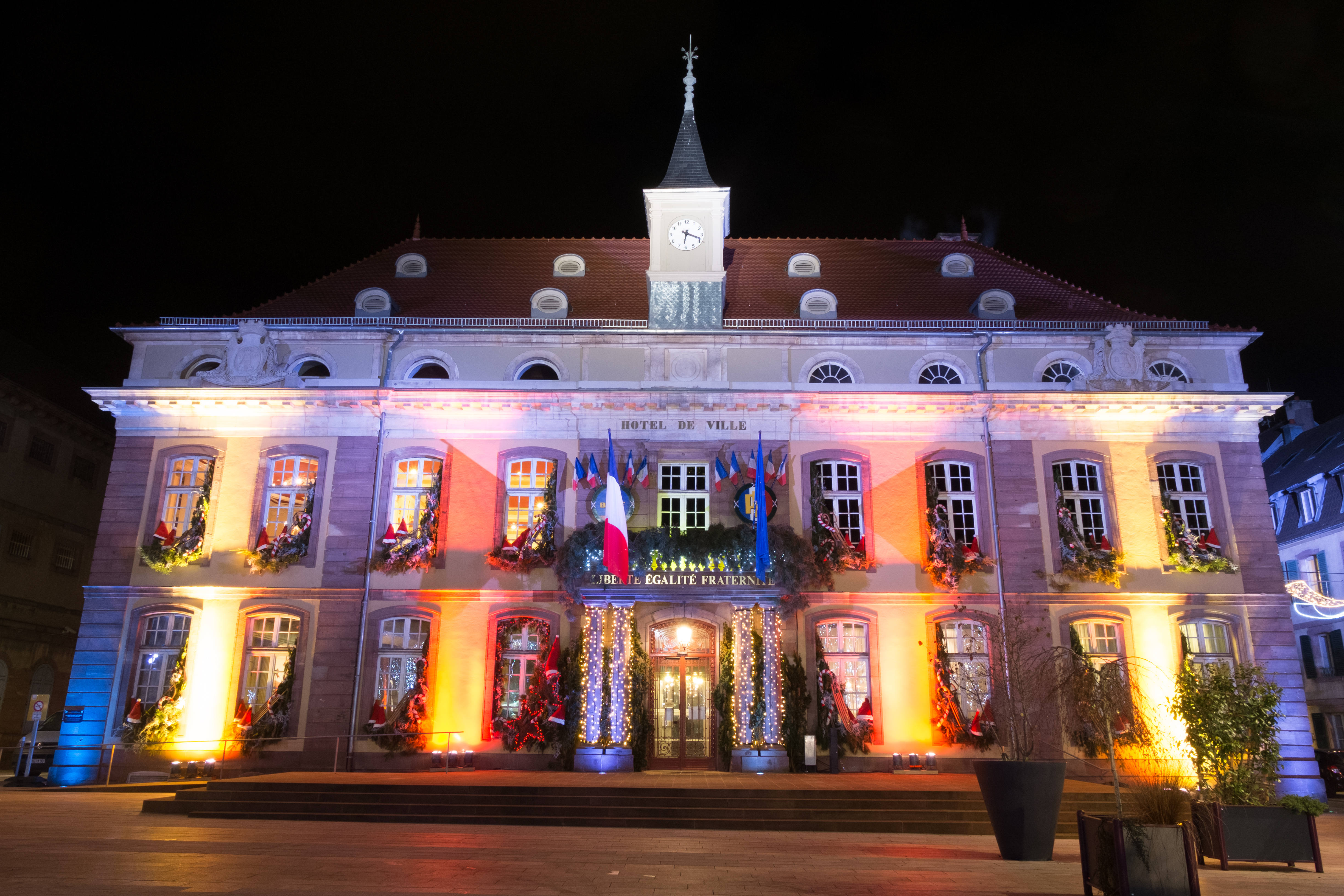 L’hôtel de Ville de Belfort illuminé